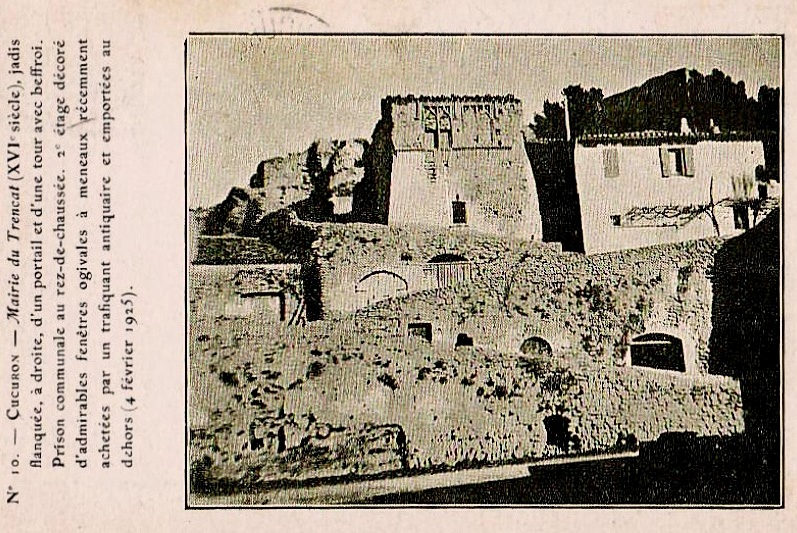 Cucuron Mairie du Trancat XVIe